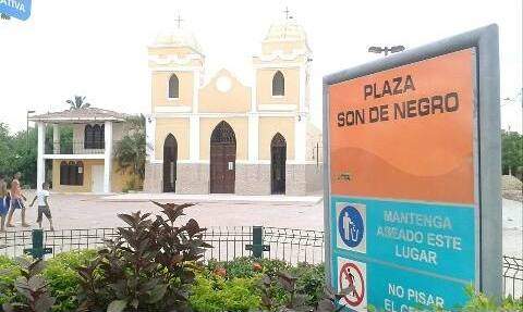 Iglesia Municipal ubicada en la Plaza son de Negro del municipio